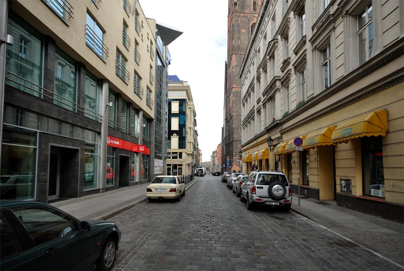 Ulica Kiełbaśnicza, widok w stronę św. Mikołaja.